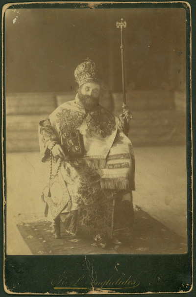 Евстатий Пелагонийски